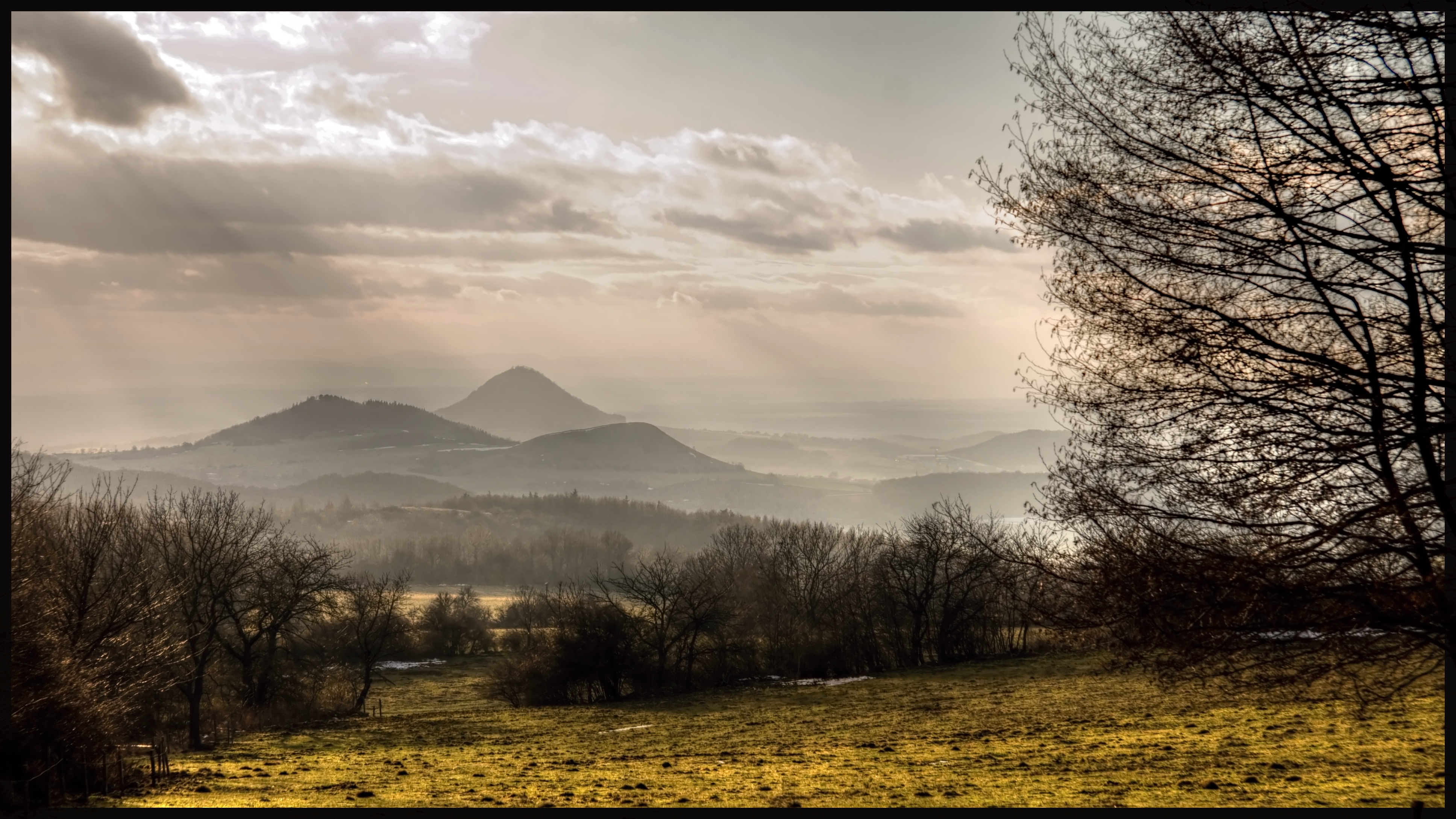 Milá Hill from Hradišťany